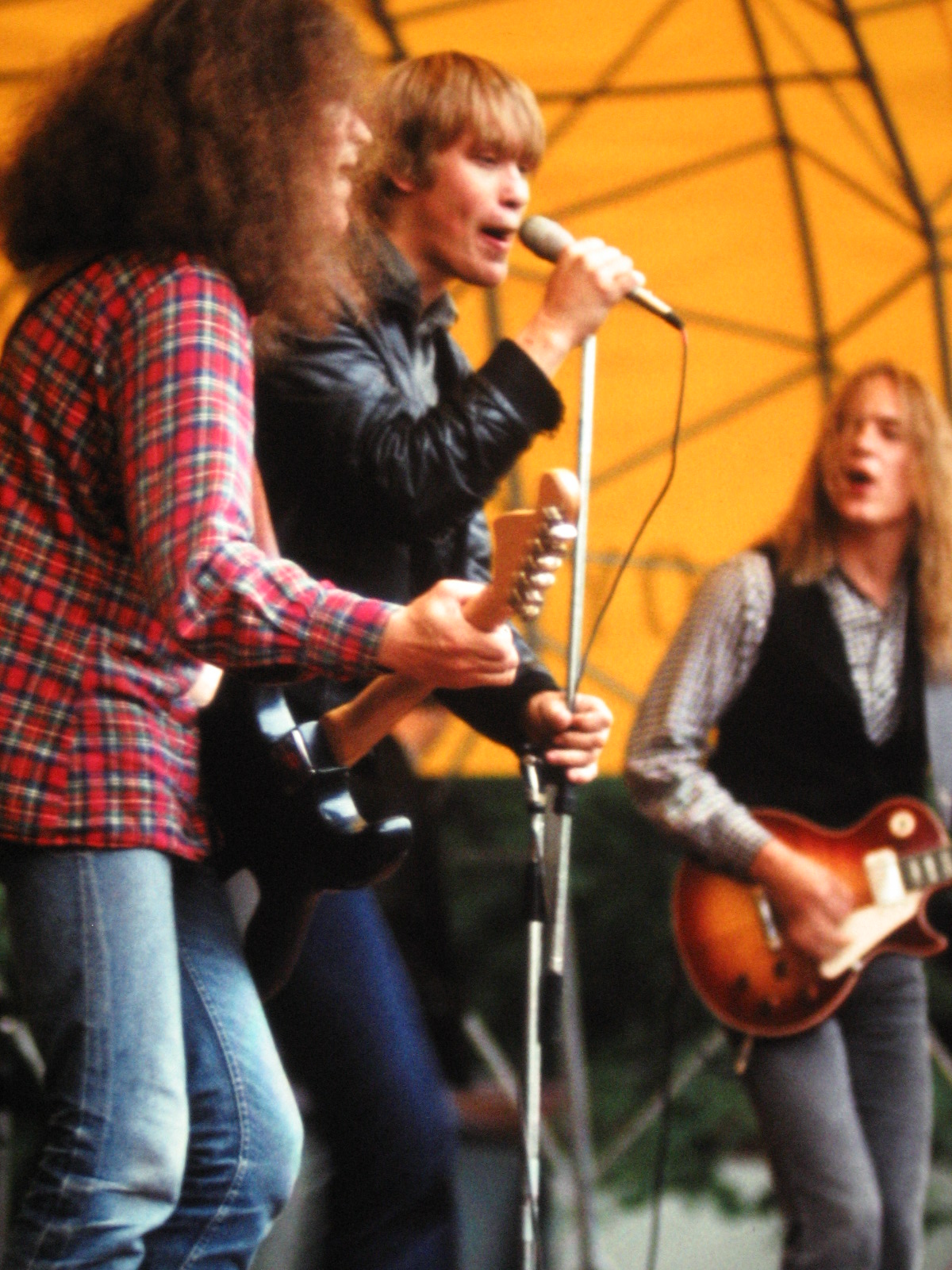 Eppu Normaali Kaivopuiston keikalla